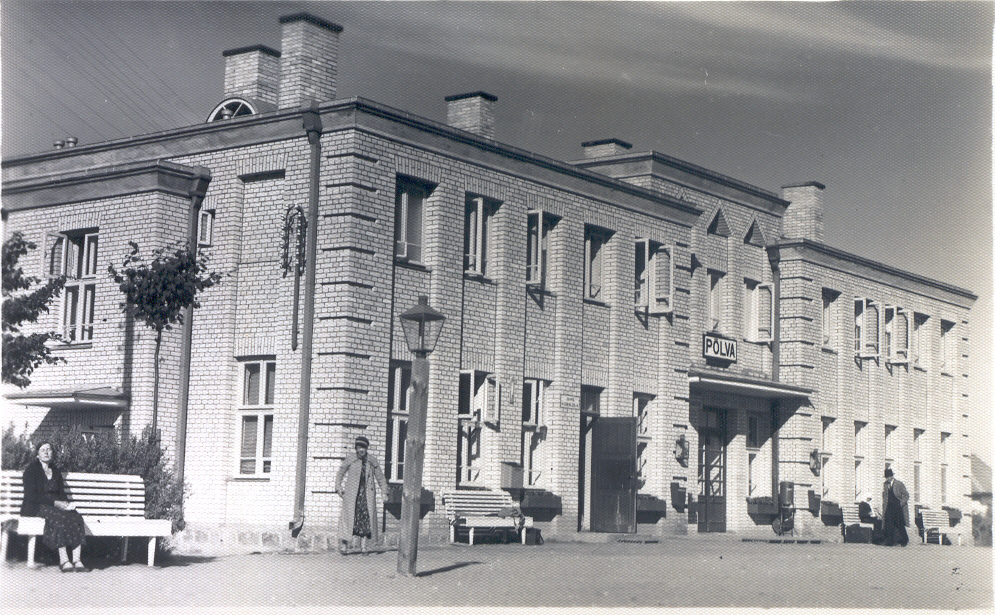 Põlva raudteejaama hoone 1930. aastatel